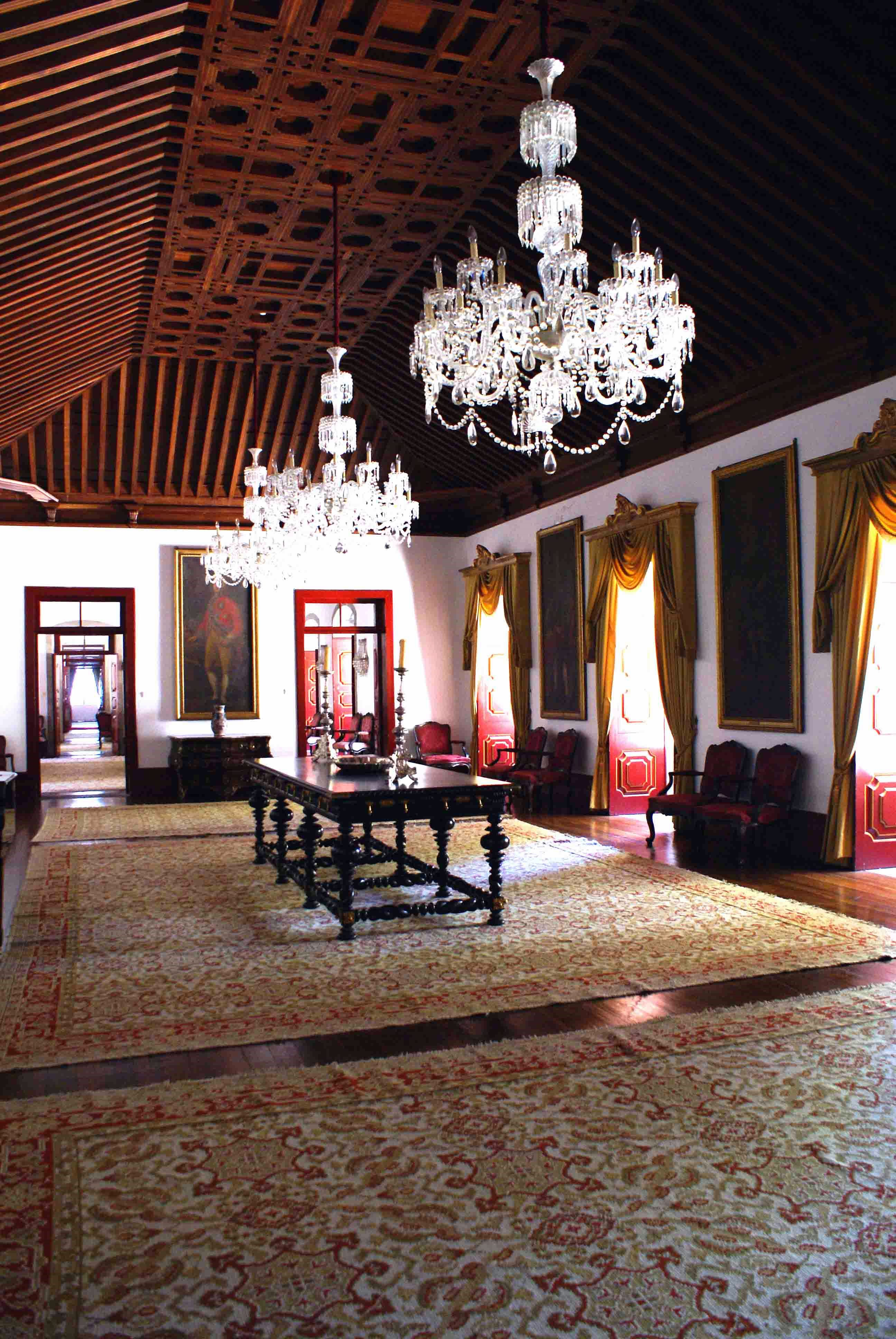 Palácio dos Capitães Generais, Salões, ilha Terceira, Açores, Portugal.